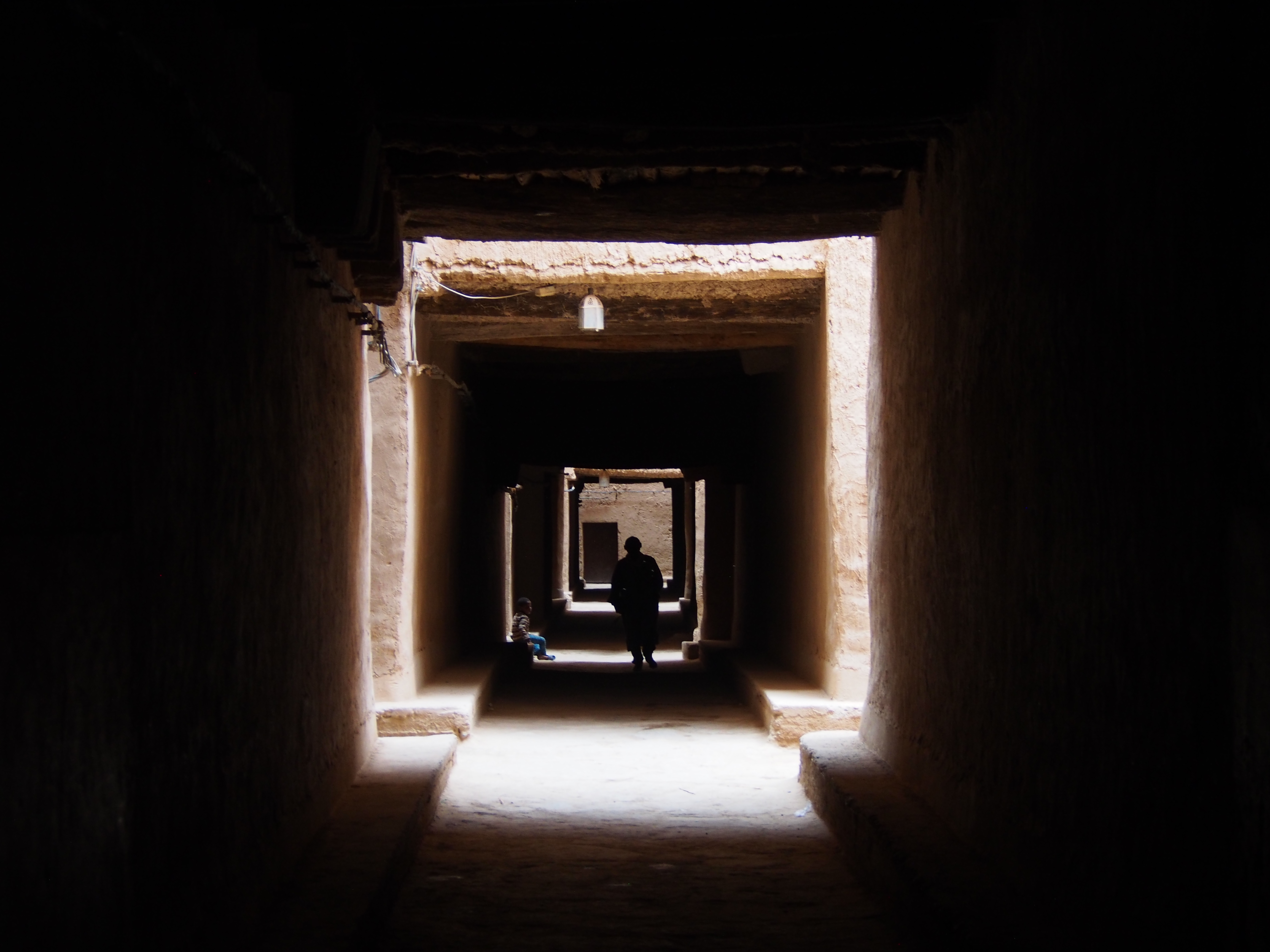 Im Ksar El Khorbat von Tinejdad, Marokko